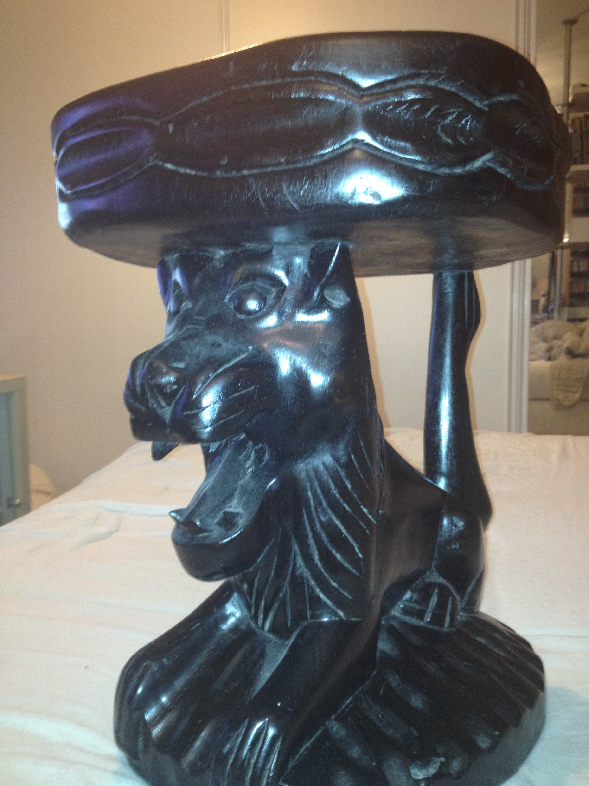 Siège traditionnel bamiléké taillé (lion)